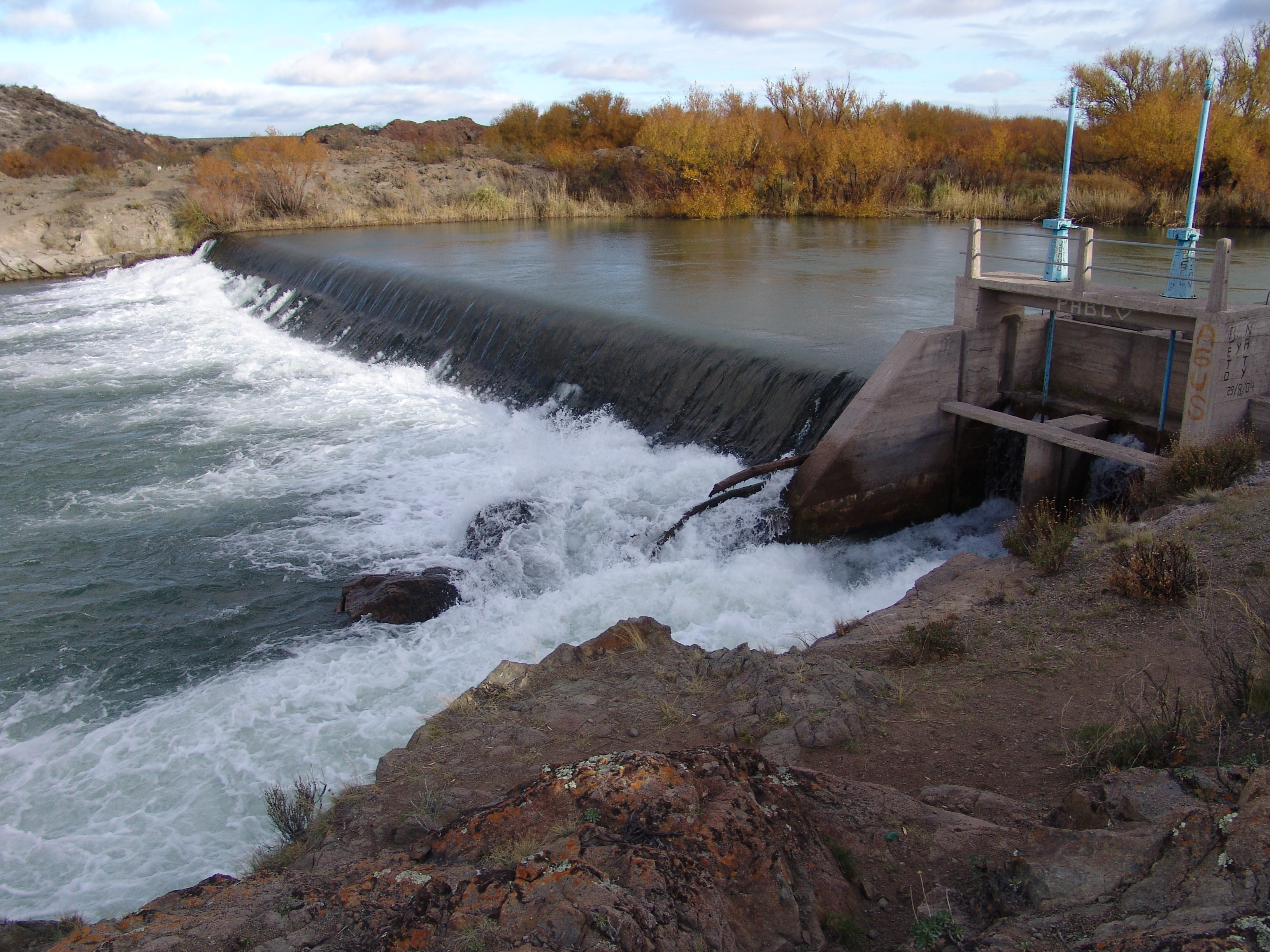 Salto de agua sobre el Río Chubut